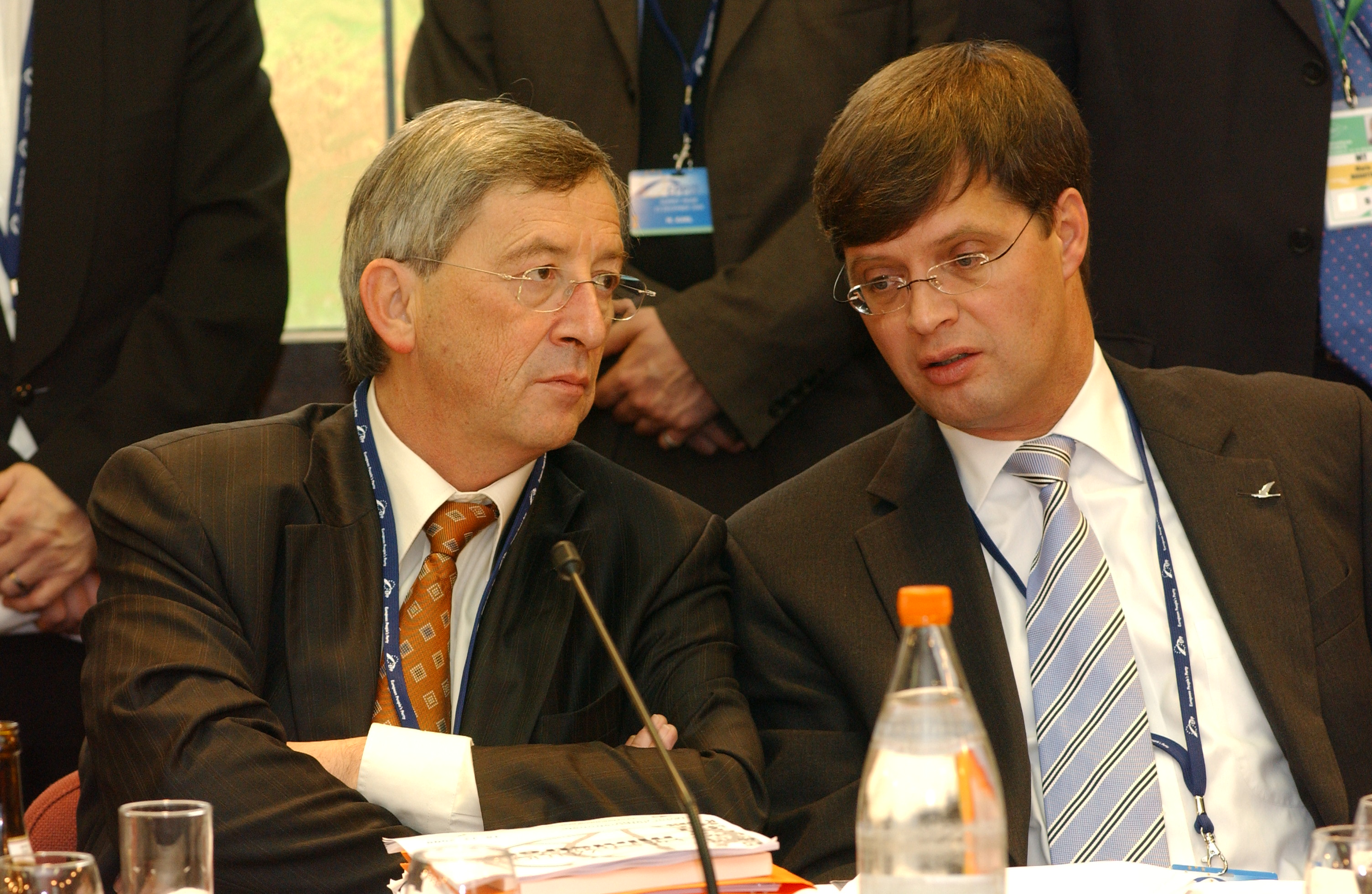 EPP Summit 15 December 2005